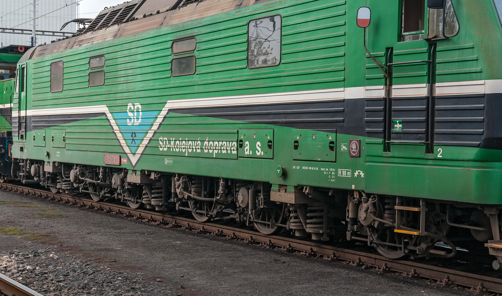 Detail pojezdu lokomotivy řady 184, konkrétně 184.504.